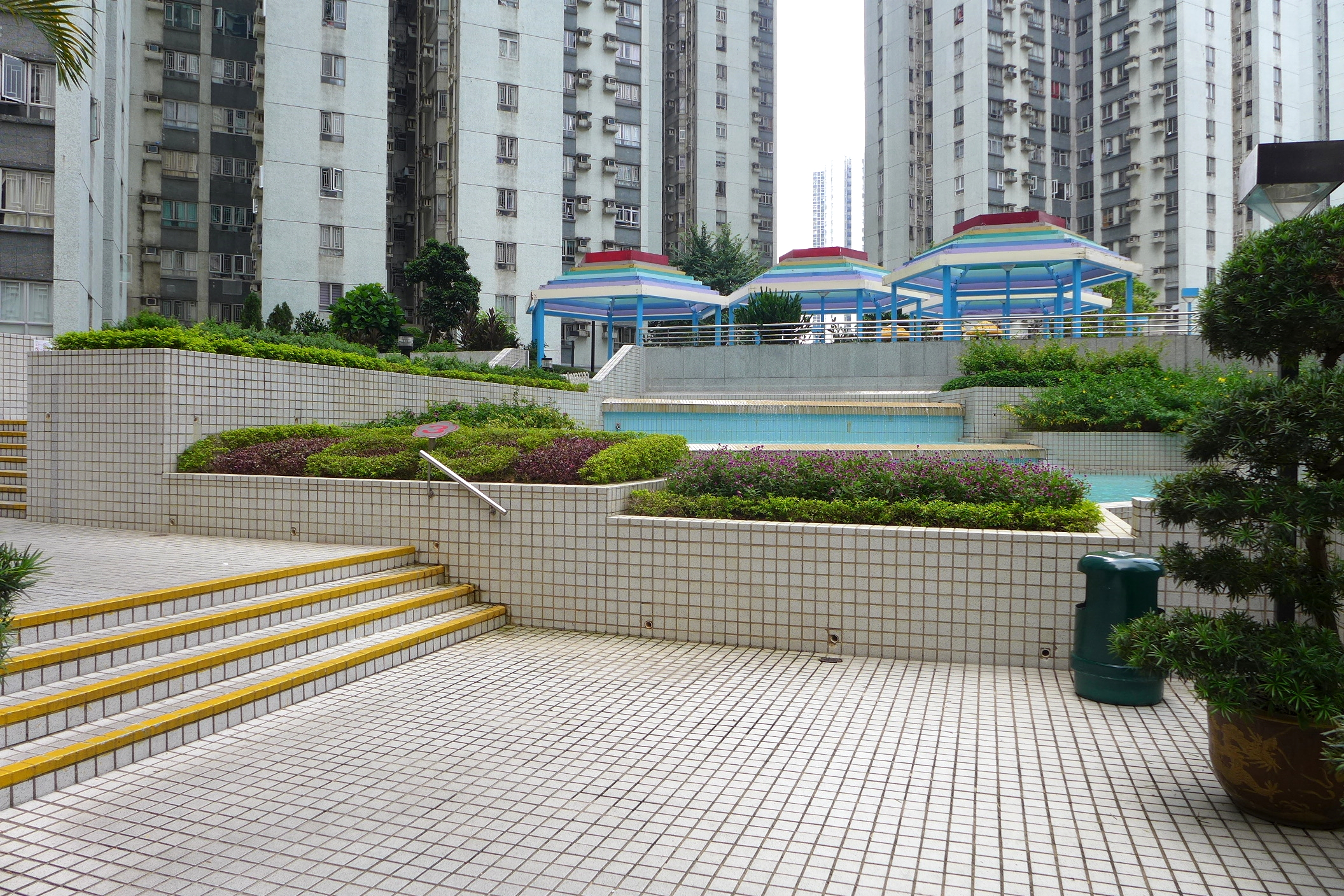 Belvedere Garden Fountain